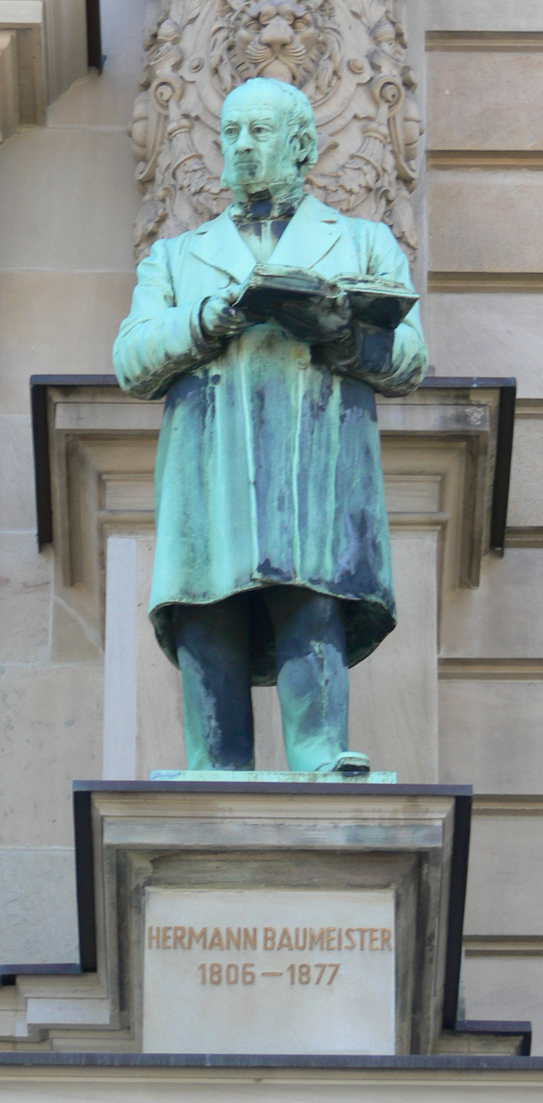 Hamburg, Ziviljustizgebäude, Statue Hermann Baumeister von Georges Morin